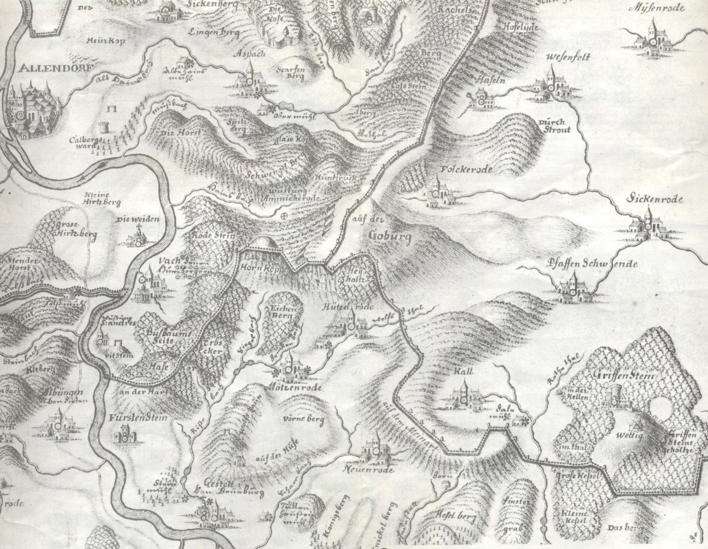 Ausschnitt aus der Schleenstein'schen Karte Blatt 10, Eschwege, Landesaufnahme der Landgrafschaft Hessen von Johann Georg Schleenstein (Aufgenommen und bearbeitet 1705-1715), Maßstab 1:52629 (mit Darstellung der Grenzlinie und der Grenzsteine zwischen Hessen-Kassel und dem kurmainzischen Eichsfeld)